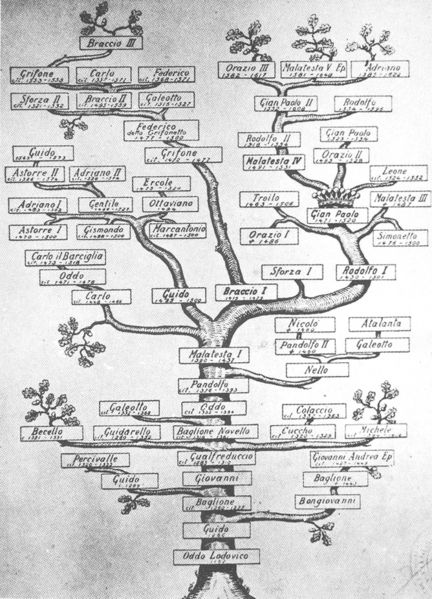 Arbre généalogique Famille Baglioni